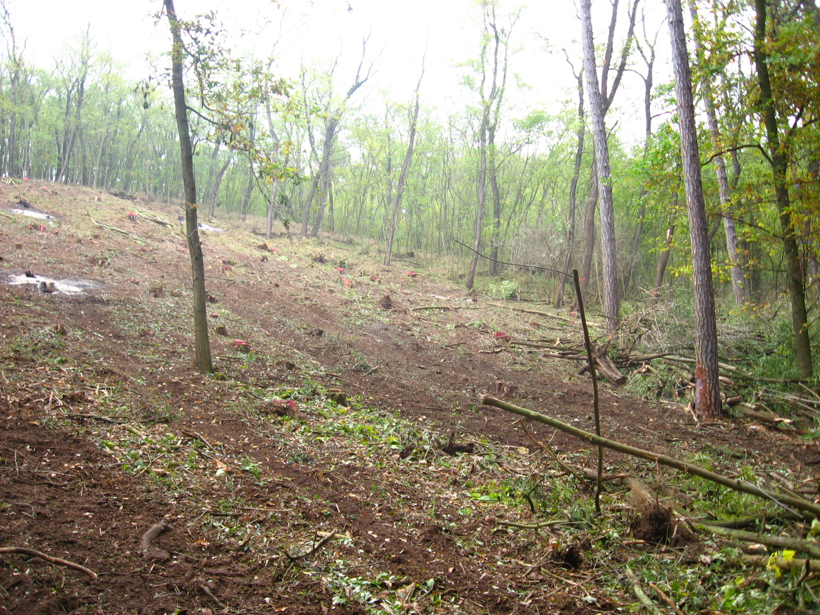 Vykácený fragment akátů na severním svahu